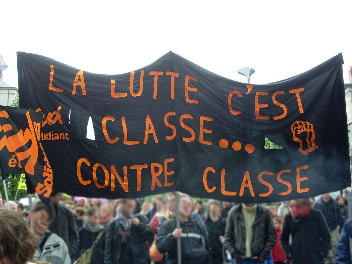 Photographie du cortège Sud Etudiant/solidaires à la manifestation du 1er mai 2008 (Nantes).